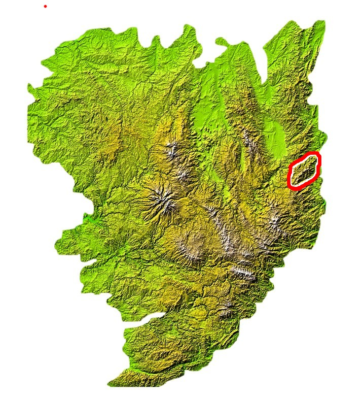 Massif du Pilat sur la carte du Massif Central